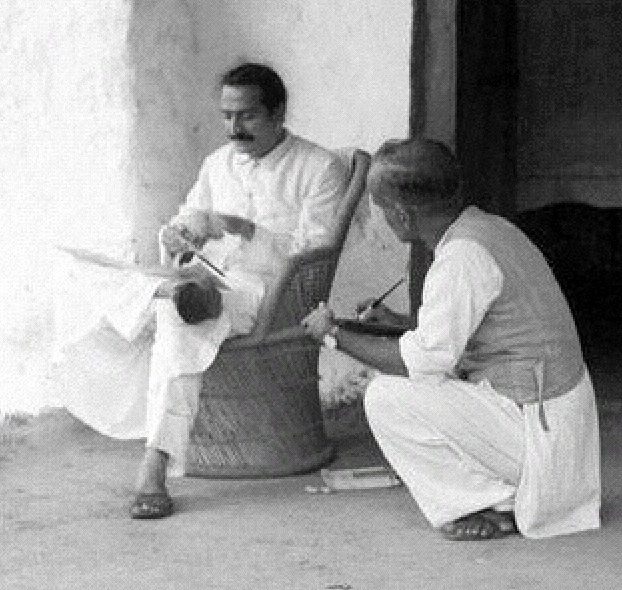 Meher Baba dictating a letter using his alphabet board, Rahuri (India). Person writing is Dr. Abdul Ghani Munsiff. (১৯৩৬ সালে একটি বোর্ডের মাধ্যমে মেহের বাবা তার এক শিষ্যকে তার বার্তা বুঝিয়ে দিচ্ছেন)